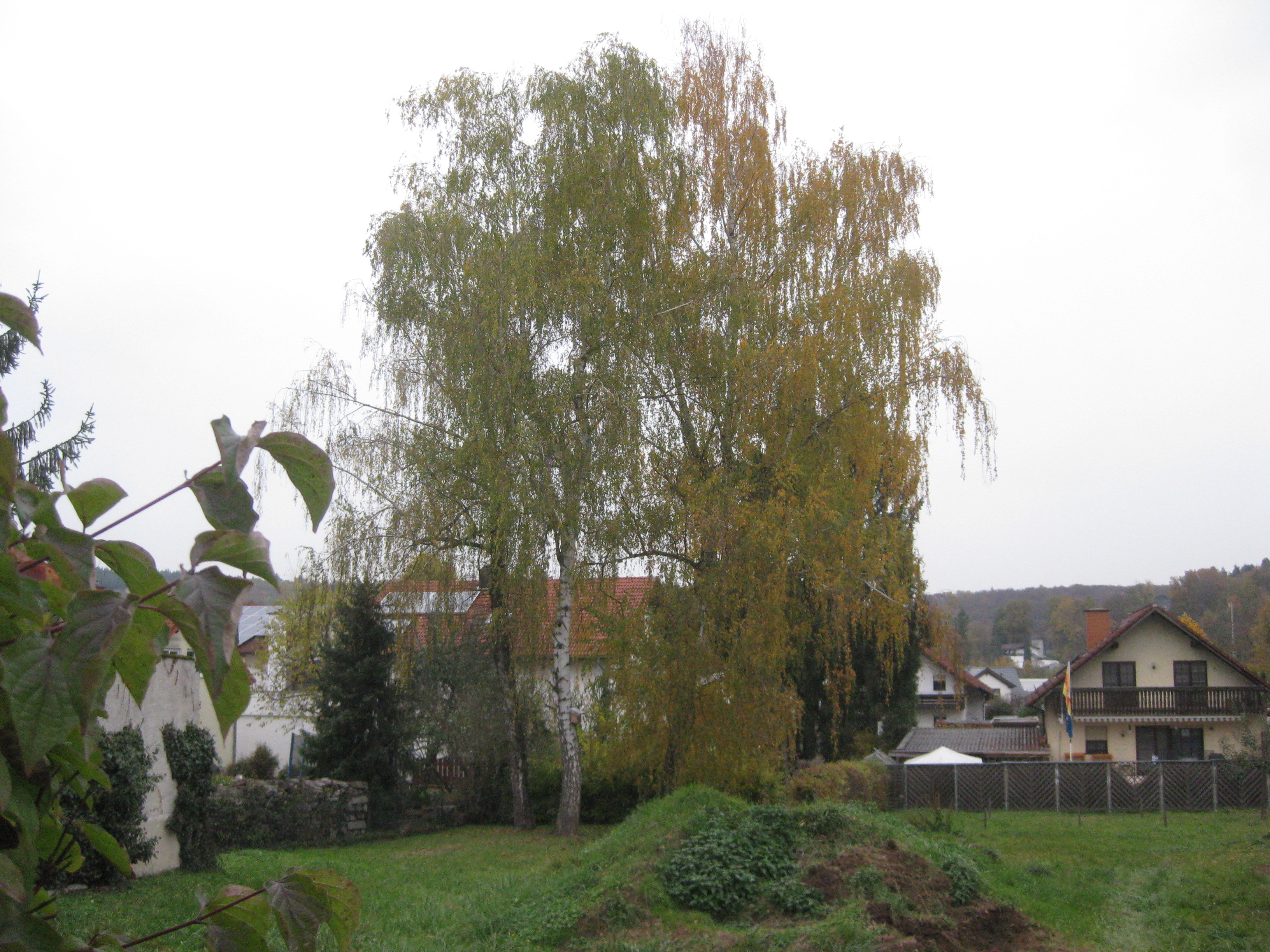 Birken im Garten der Alten Schule Eschelbronn